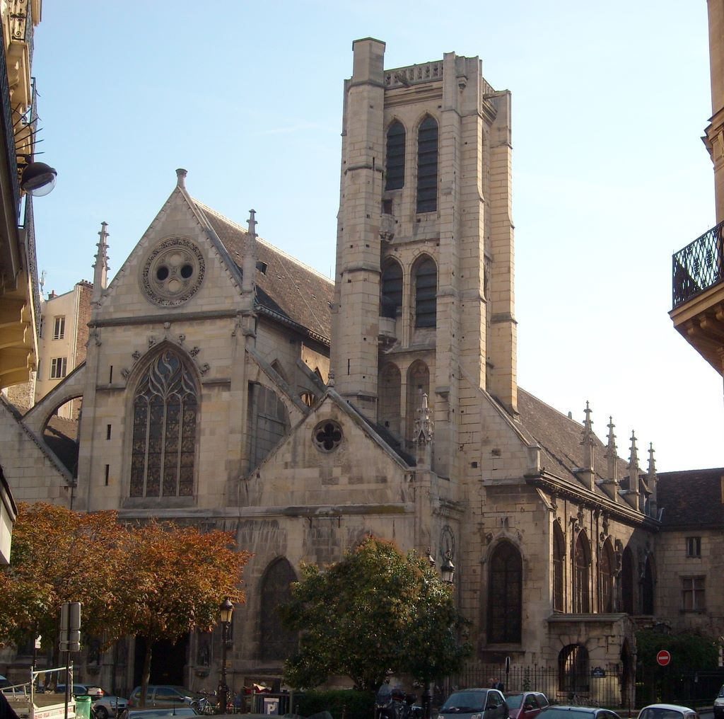 Façade ouest de l'église Saint Nicolas des Champs, photographie prise de la rue Greneta